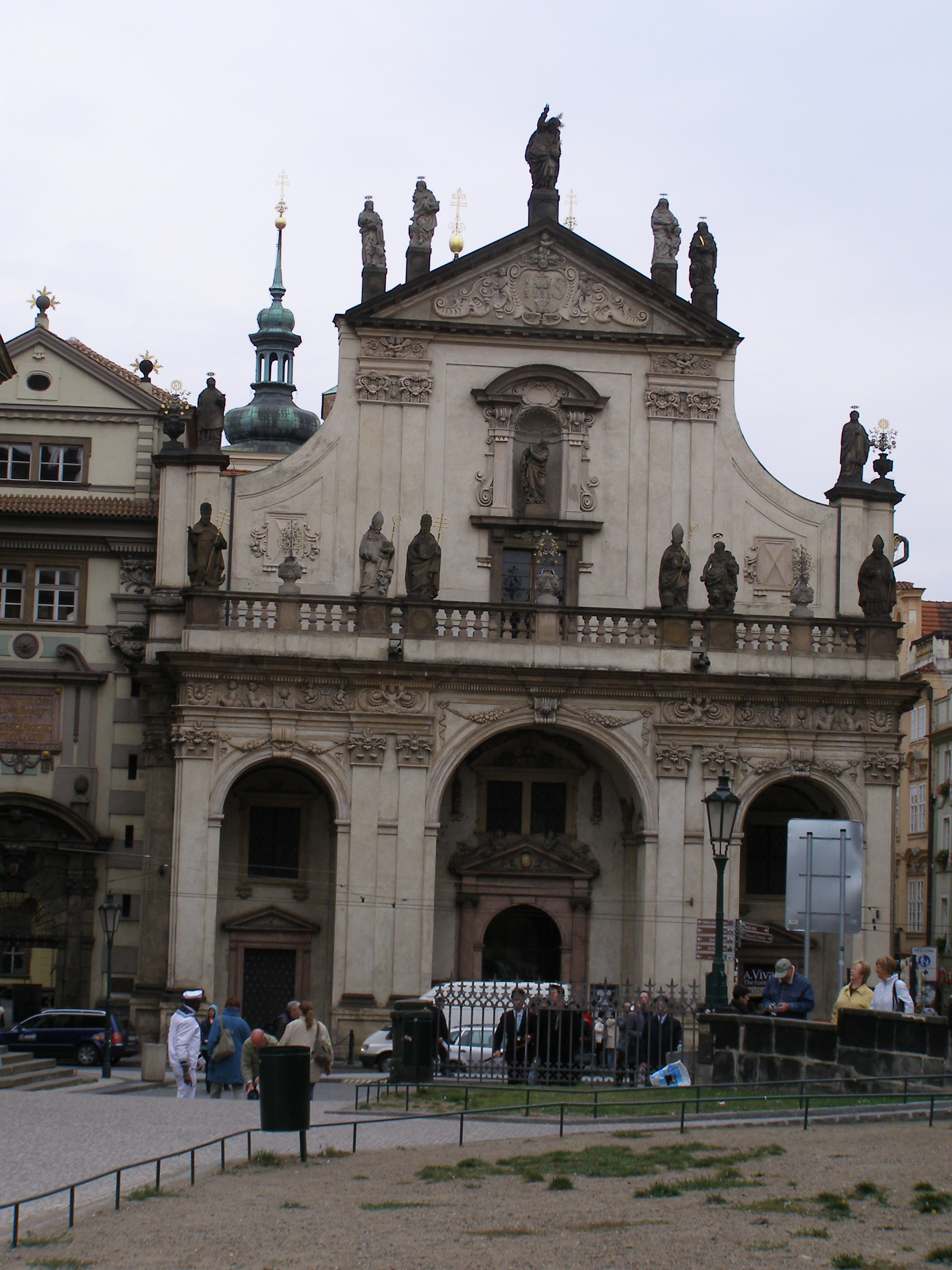 Kolej Klementinum (Staré Město), Praha 1, Křižovnické nám., Karlova 190, Staré Město